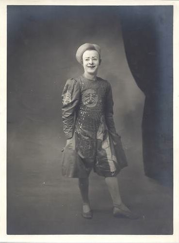 Majestueux clown.